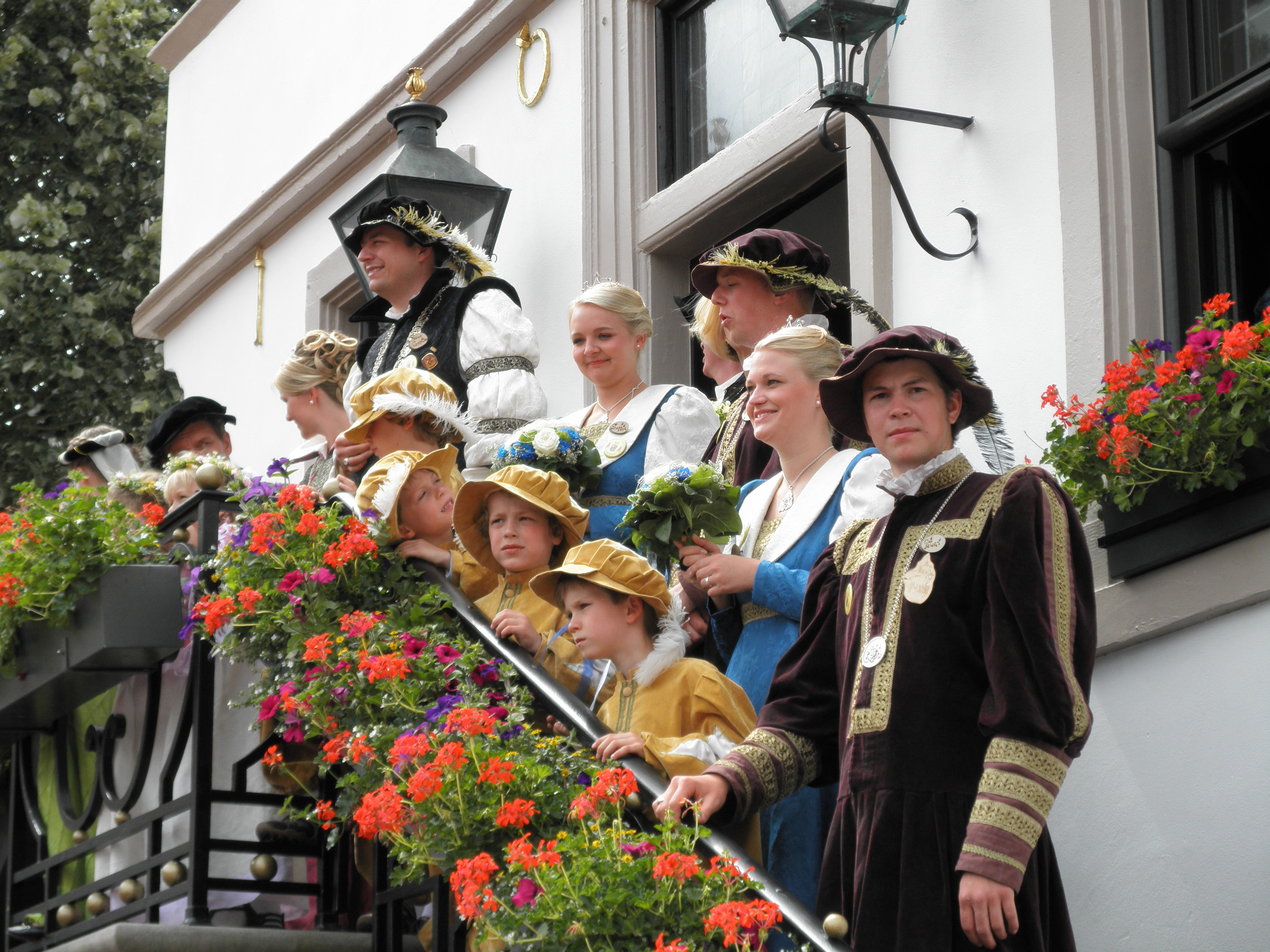 la festaj "gravuloj" spektas la paradon de siaj subuloj de la urbodoma ŝtuparo en la mezepoka Kivelingsfest 2011 en Lingen (Ems)